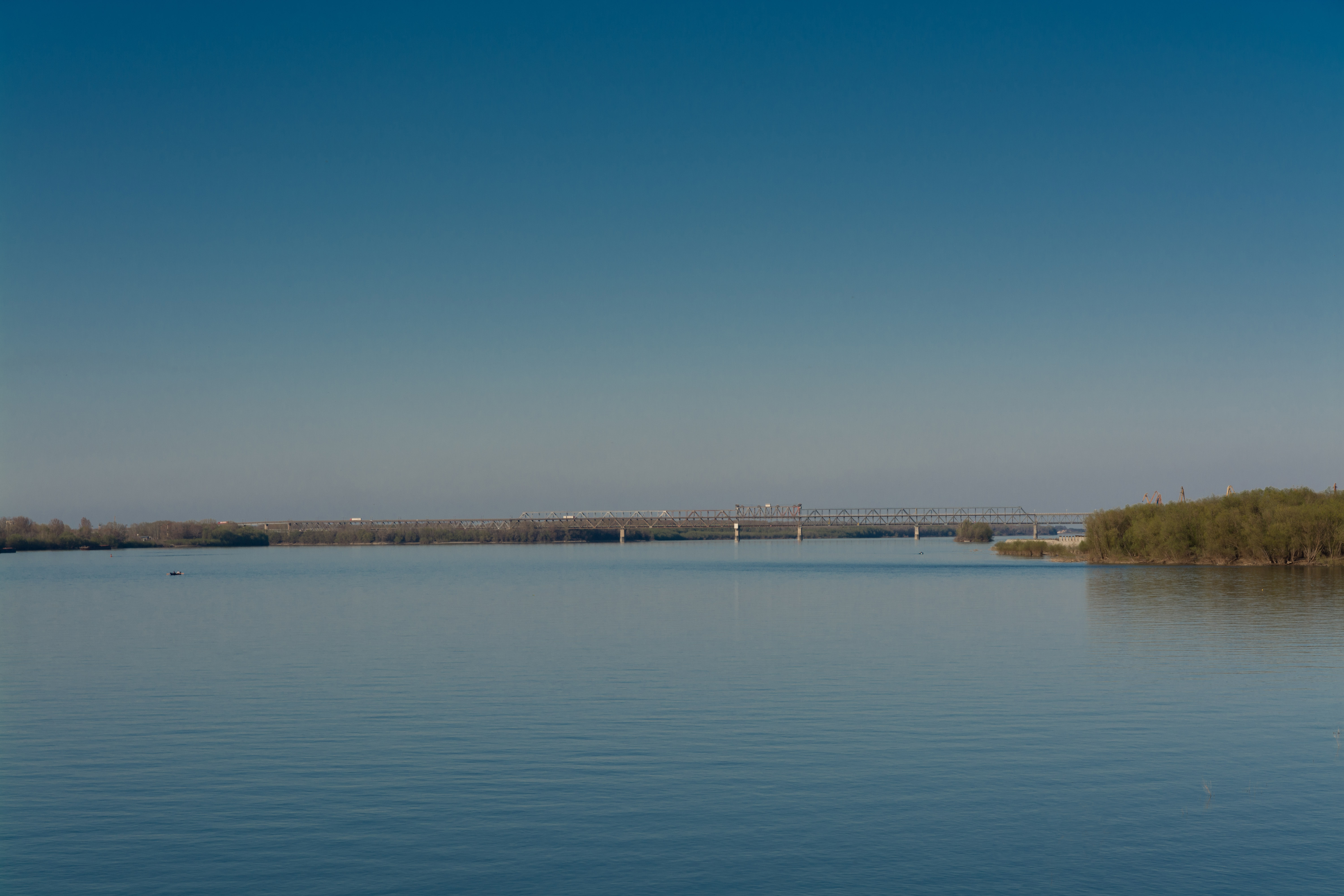 Река Дунав край Русе